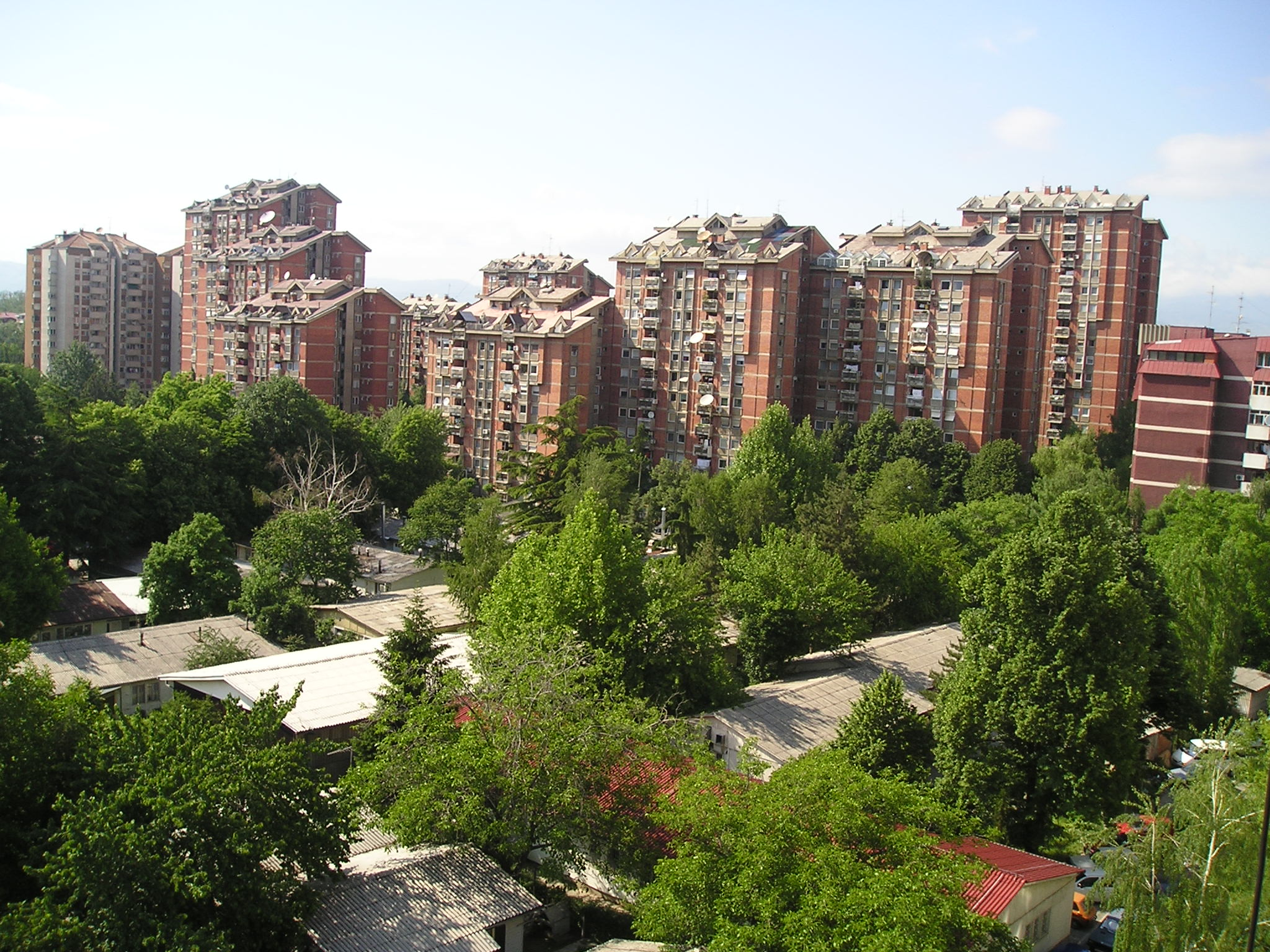 Зградите со фасадна цигла по кои е препознатлив Капиштец (ова е западниот дел)